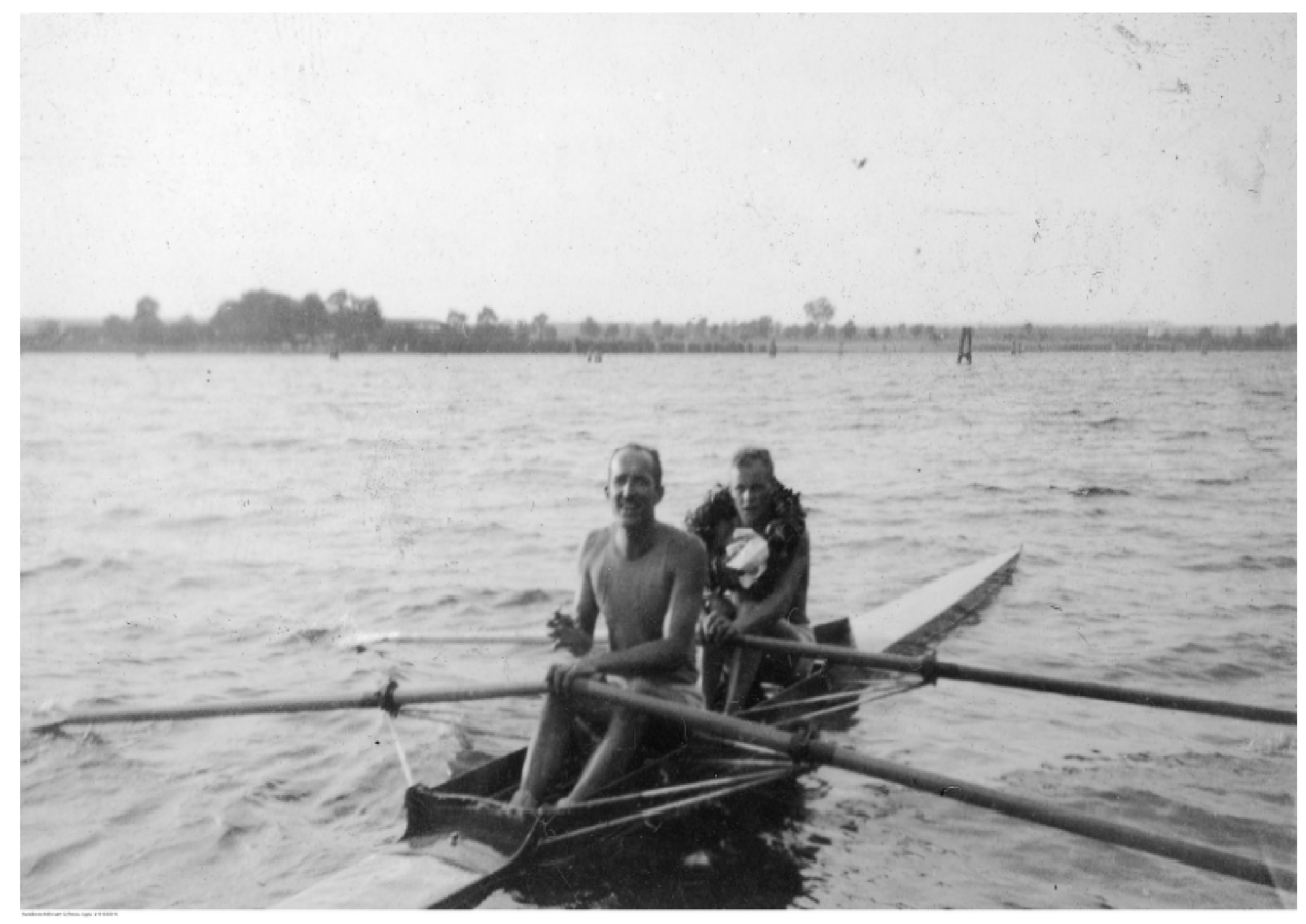 Dwójka podwójna WTW Warszawa D. Tilgner, J. Patecki, Mistrzowie Polski 1934.